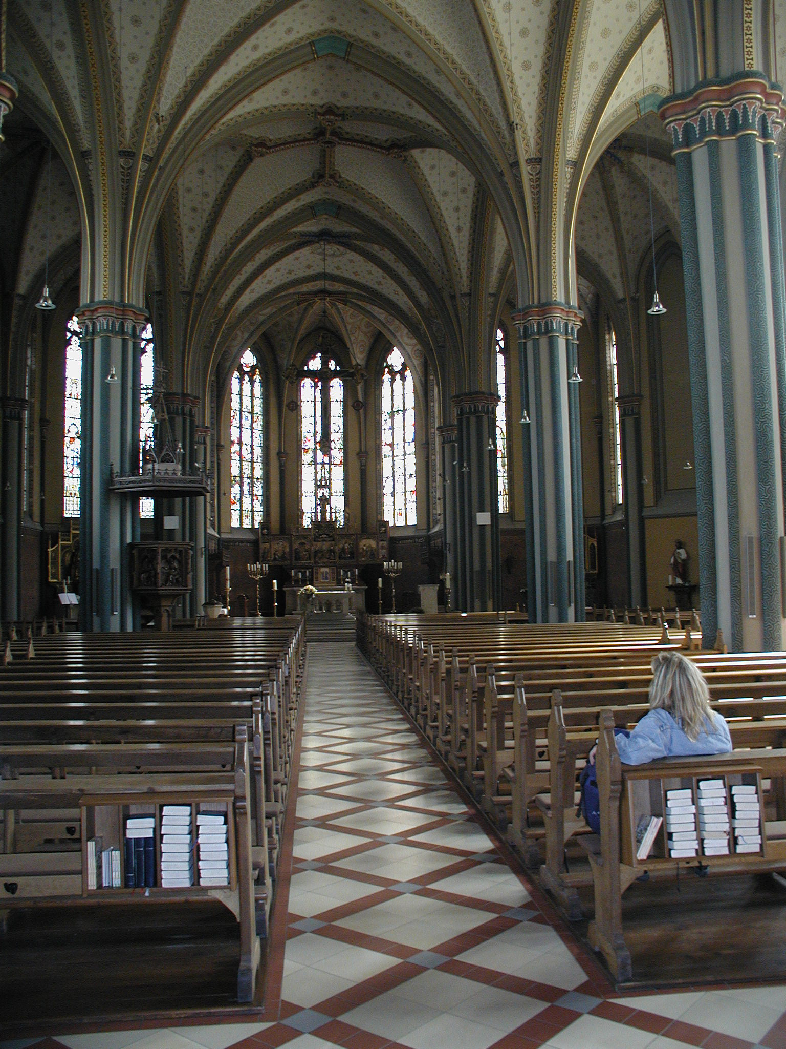 Bawinkel-Emsland